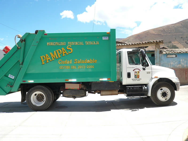 Camión recogedor de basura en la ciudad de Pampas, Tayacaja, Perú.